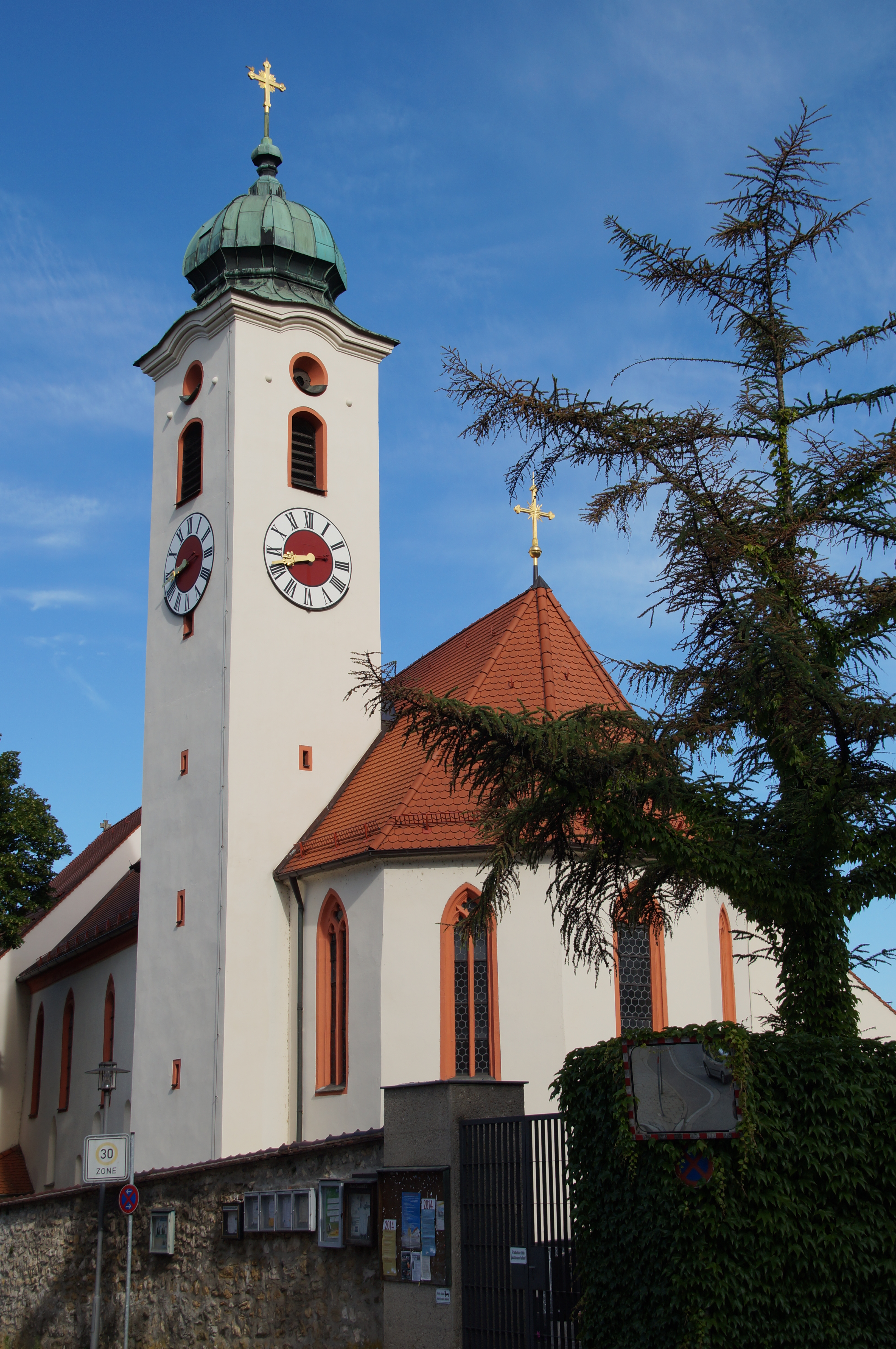 Katholische Pfarrkirche Mariä Himmelfahrt, Saalbau mit Satteldach, eingezogenem Chor und Chorflankenturm mit Haubendach, im Kern romanisch, 12. Jahrhundert, Chor 2. Hälfte 14. Jahrhundert, Langhaus im 18. Jahrhundert umgebaut, 1933 verlängert; mit Ausstattung; Friedhof mit Mauer, Bruchstein, mittelalterlich; Lichtsäule mit Tabernakel auf Schaft mit Relieftafeln, spätgotisch, Anfang 15. Jahrhundert; Friedhofskreuz, Korpus gusseiserner Viernageltypus an Kreuz aus Bandeisen, bezeichnet mit 1904